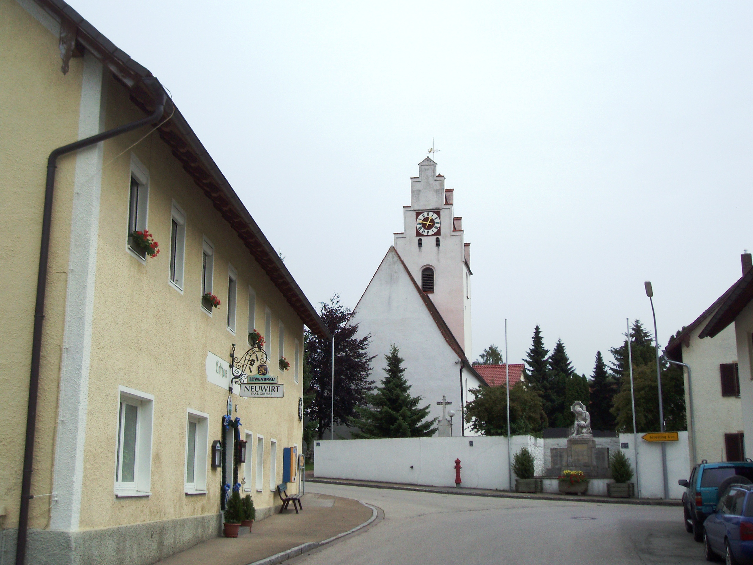 Kirche_St._Martin_in_Lobsing,_Landkreis_Eichstätt